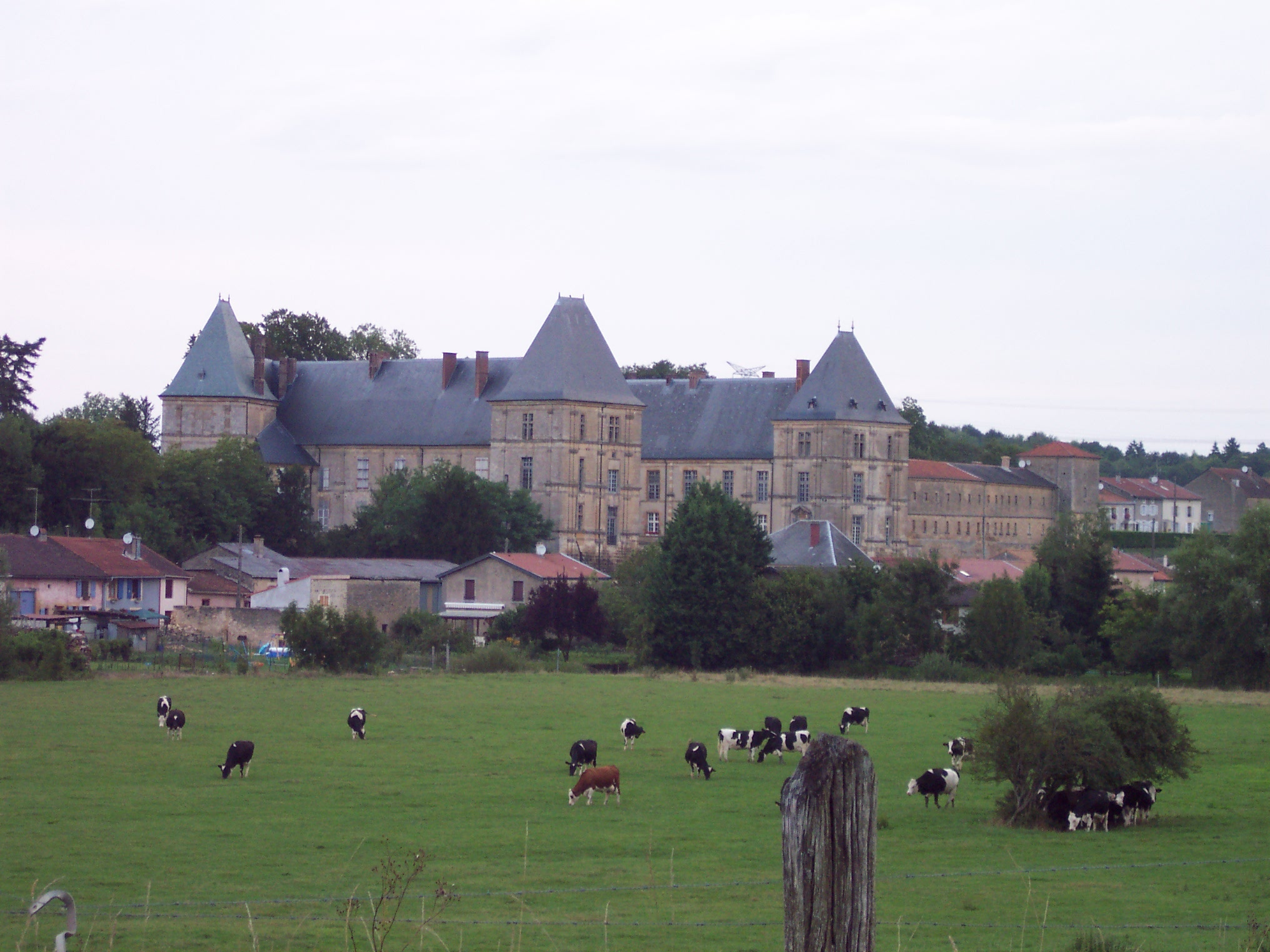 vue sur le château et le village de Louppy sur Loison